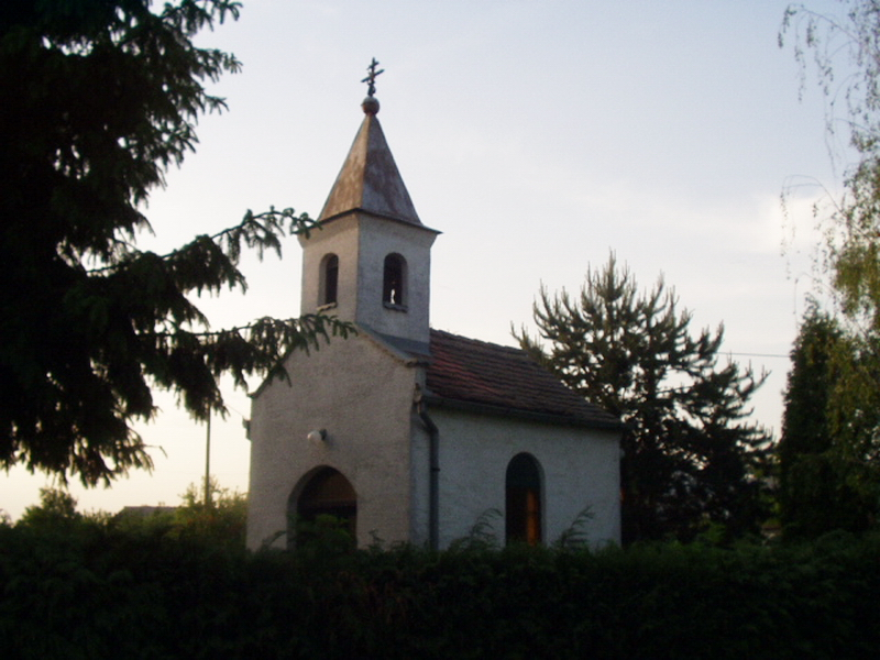 Podjales - Chapel